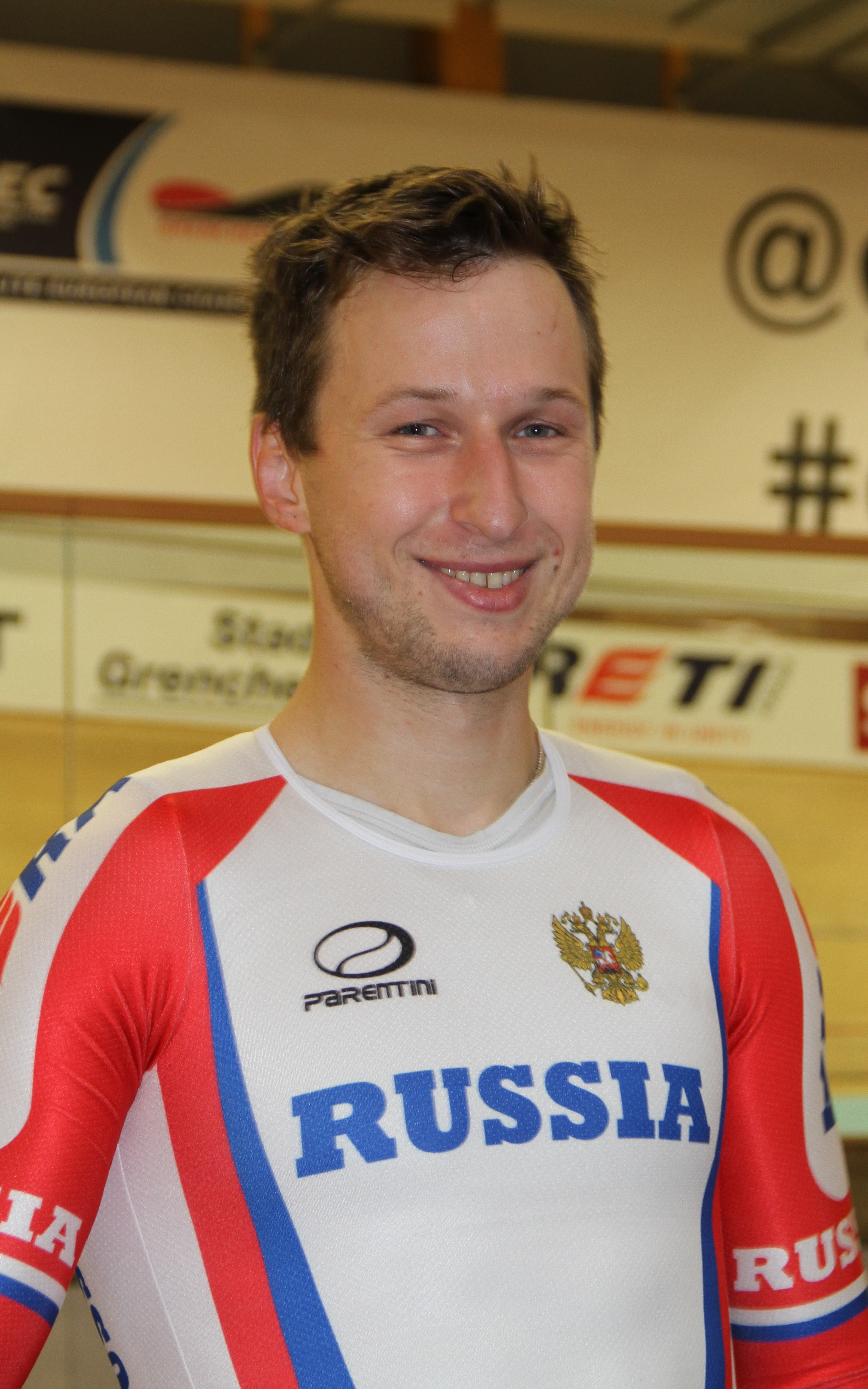 Pavel Yakushevskiy, russischer Radsportler The making of this document was supported by the Community-Budget of Wikimedia Germany.